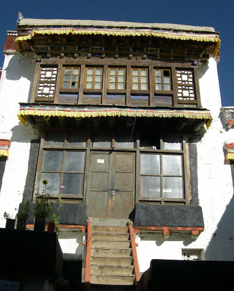 Phyang Gompa, Ladakh, India